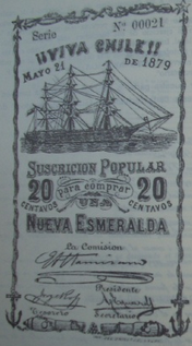 suscripcion popular para la compra de una nueva "Esmeralda"